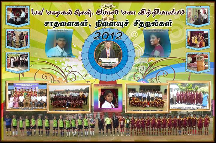 சாதனைகள்